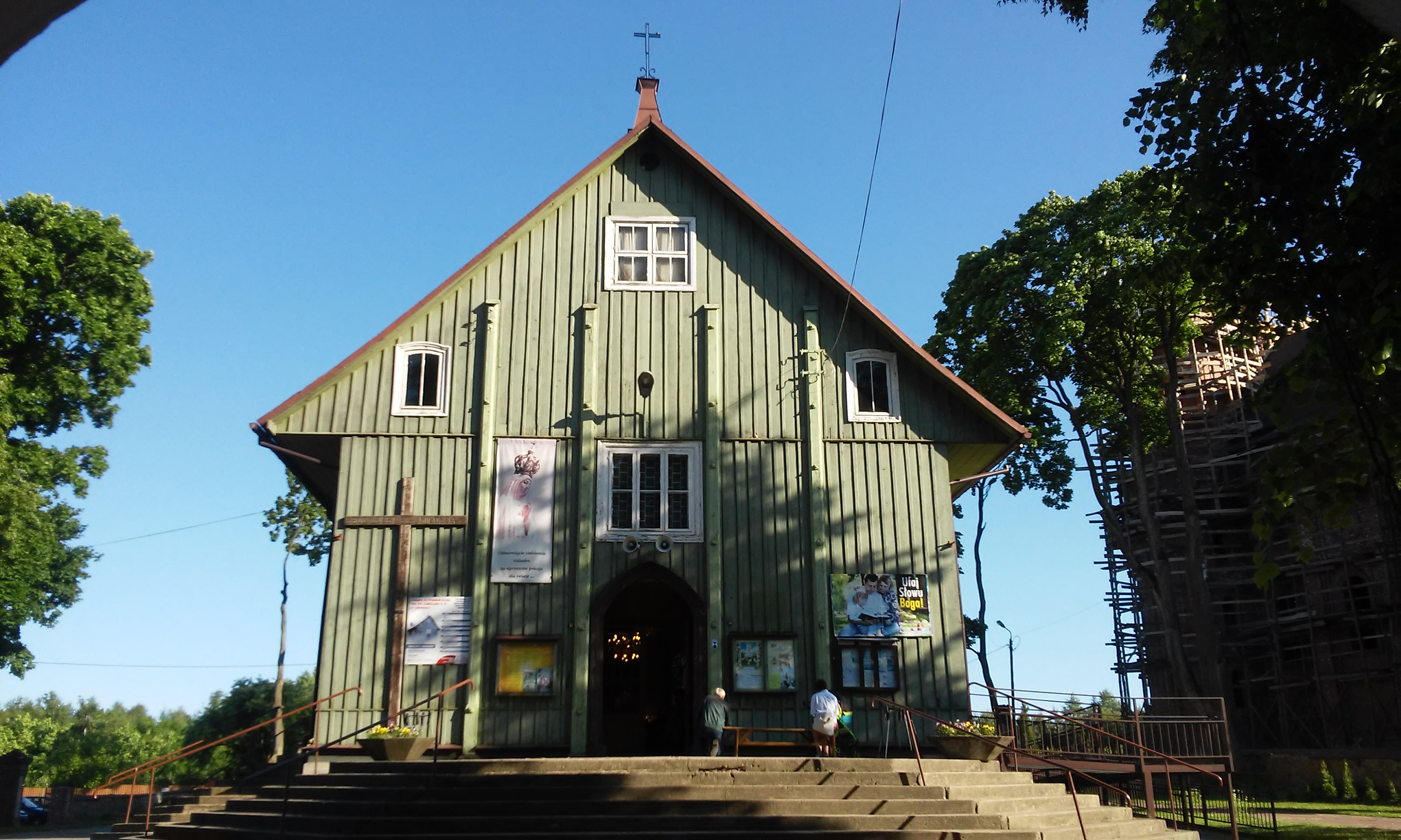 Kościół w Sarnakach